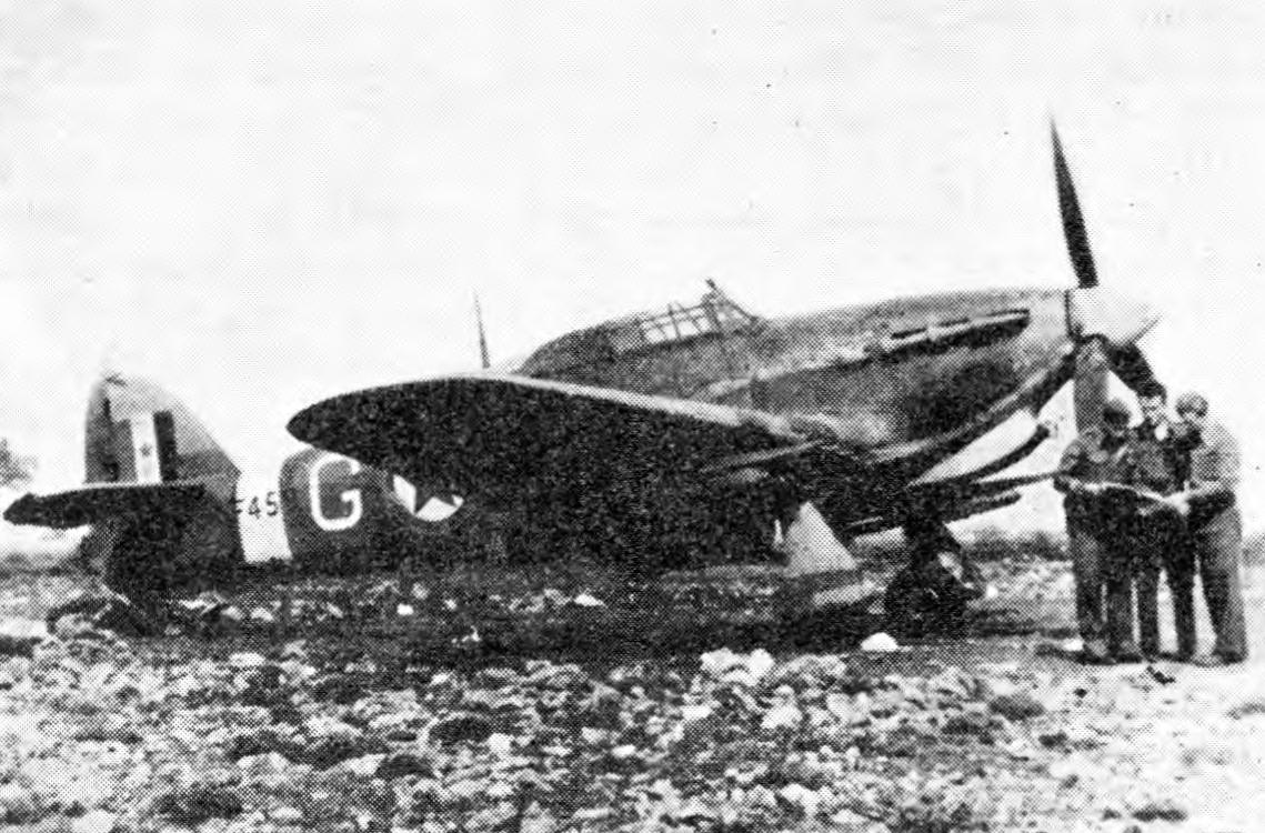 Letalo Hurricane IV RP na letališču Prkos pri Zadru leta 1945. Pod krili letala so pritrjene štiri rakete